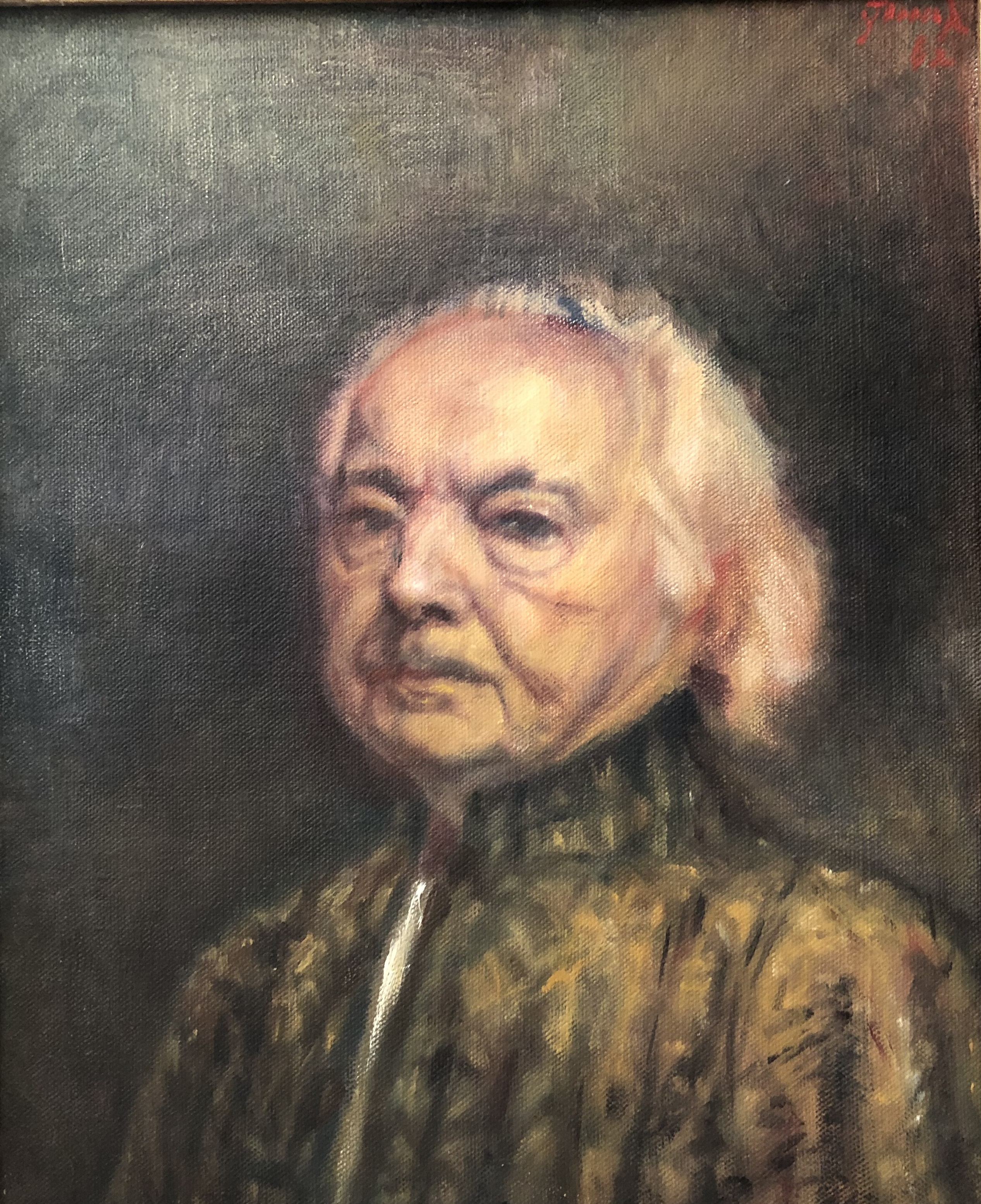 Jacob Ydema, zelfportret 1982